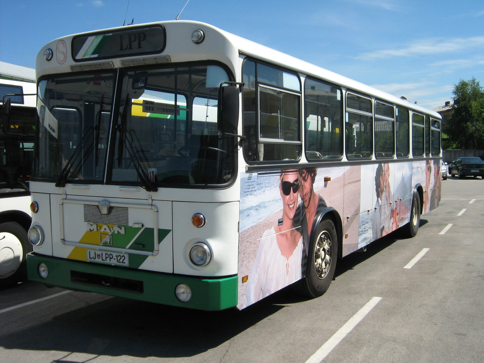 Avtobus MAN SU 220 v lasti Ljubljanskega potniškega prometa. Avtor: Uporabnik:BurekBuster